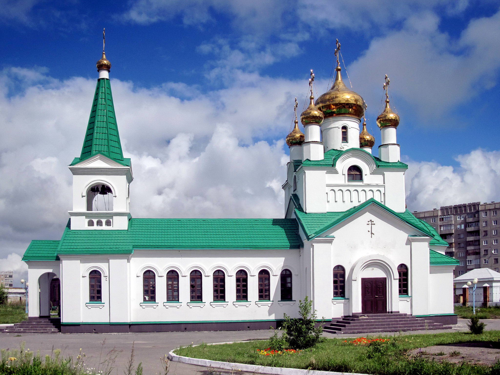 Вознесенская церковь в Заринске